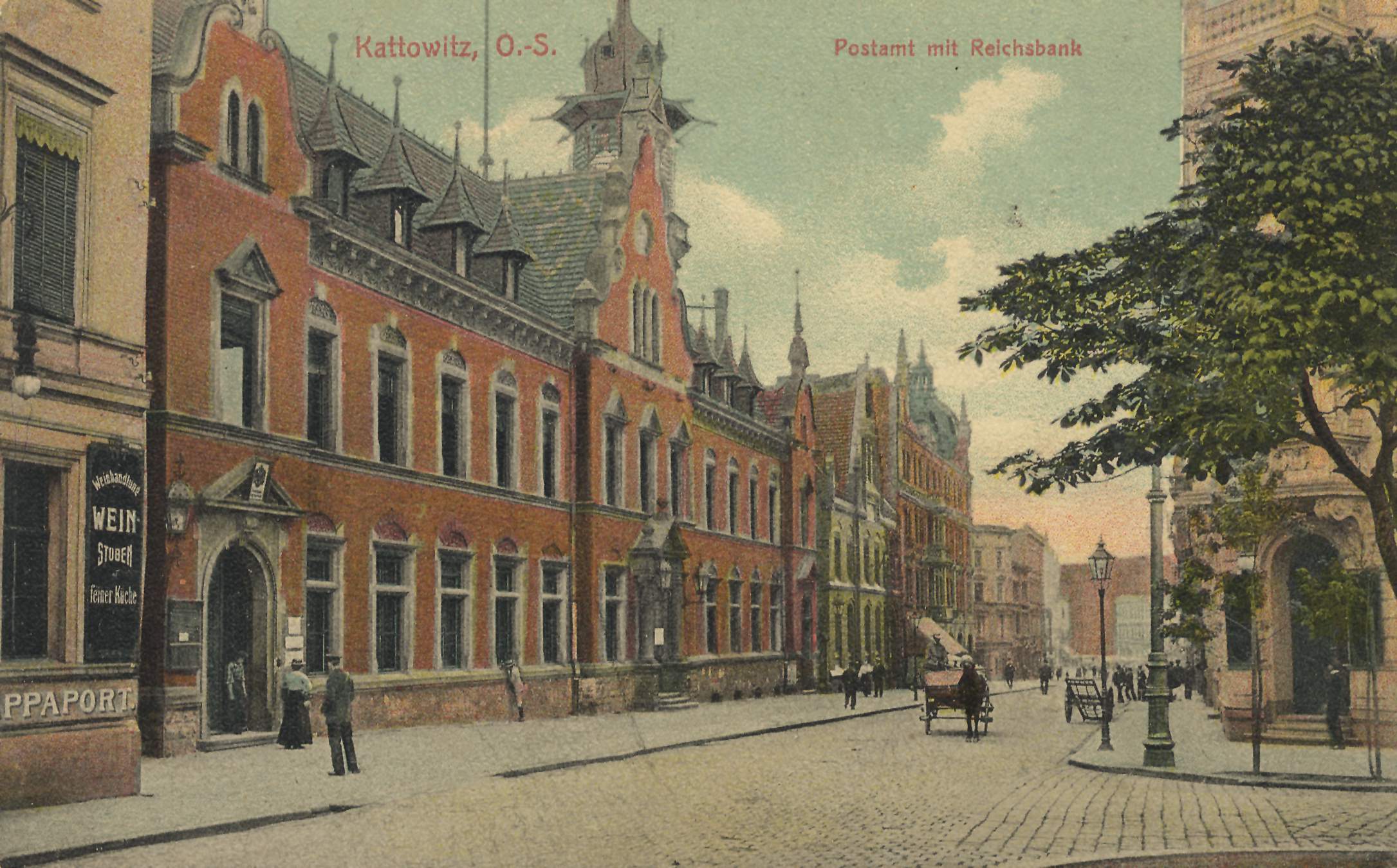 Katowice. Ul. Pocztowa.